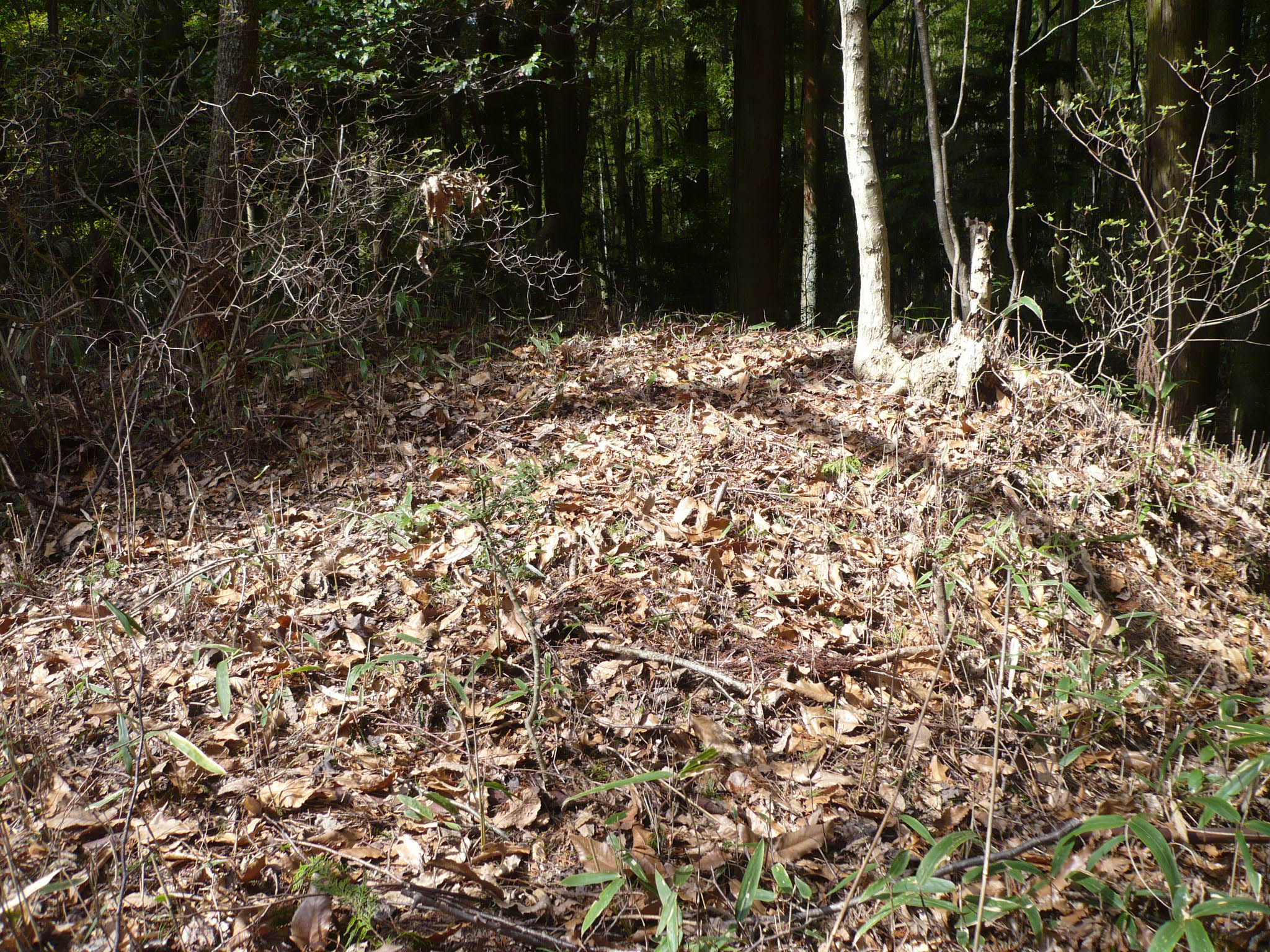 主郭櫓台跡